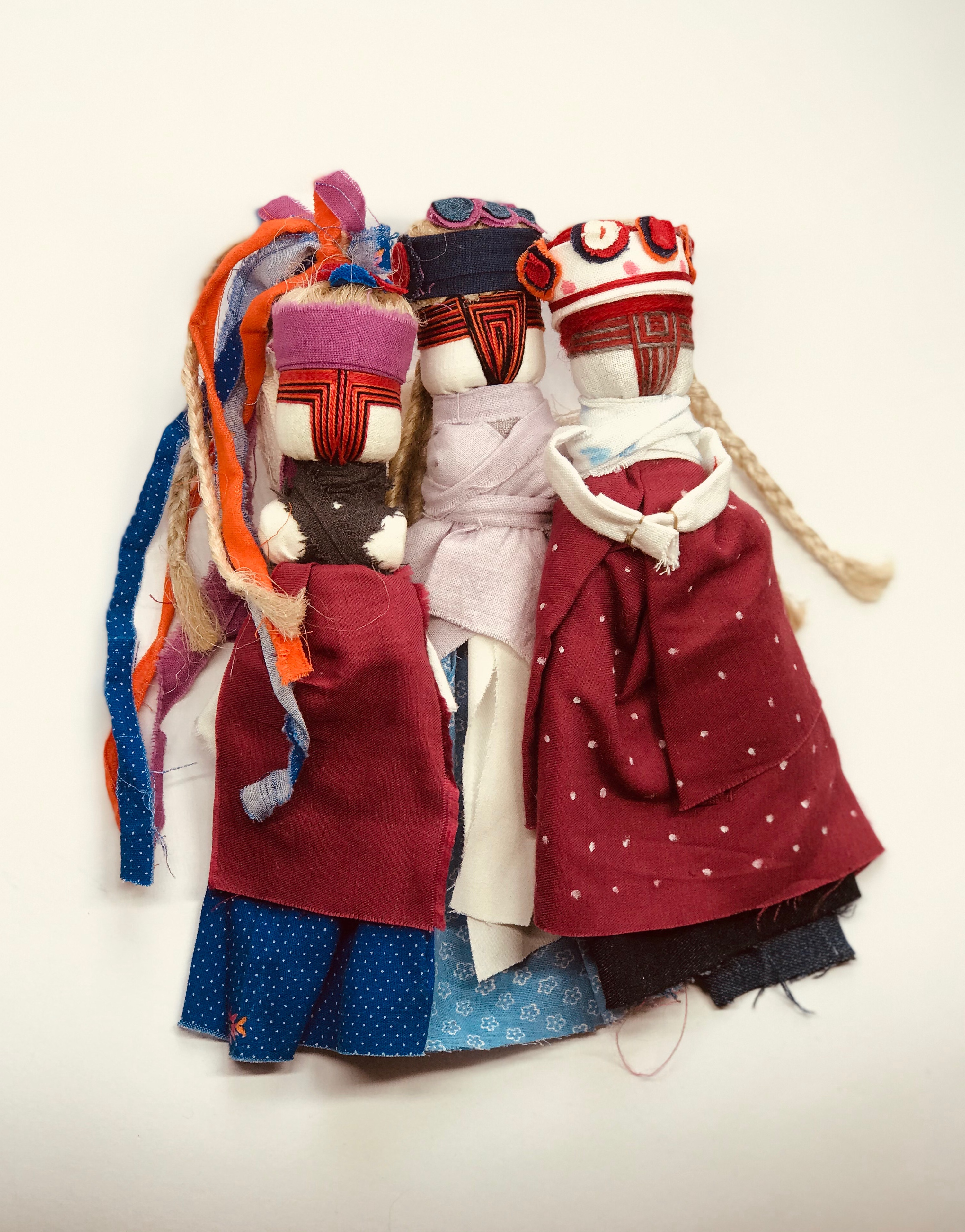 На цьому фото зображені реконструйовані українські народні ляльки